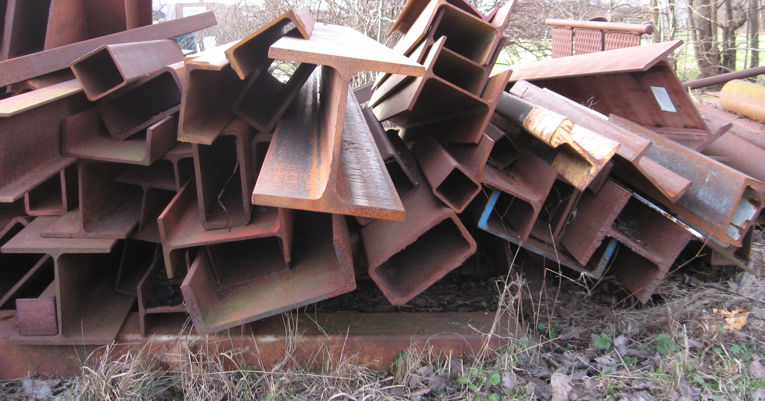 Stålprofiler